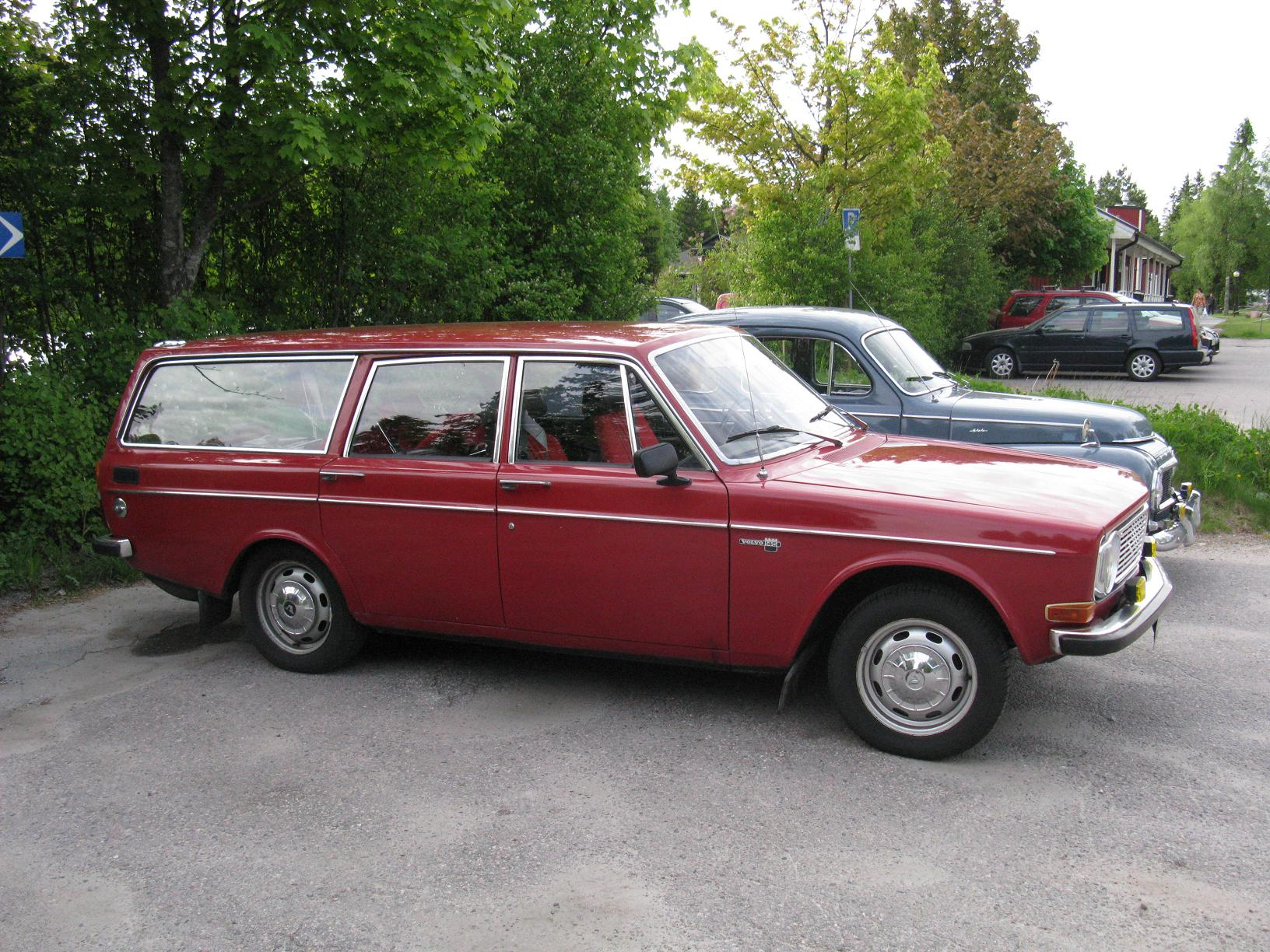 Volvo 145